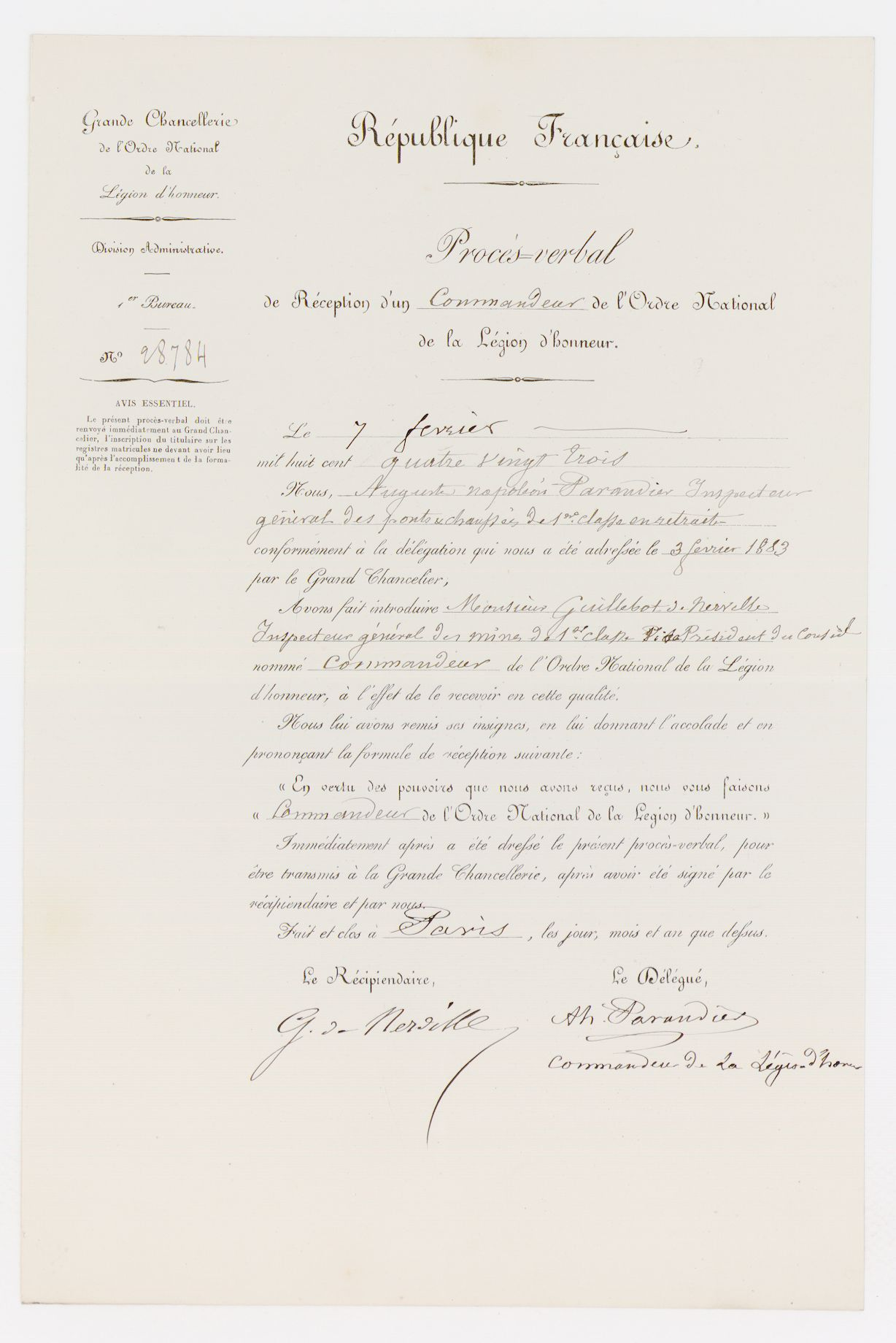 procès-verbal de remise à Jean Ludovic Guillebot de Nerville des insignes de commandeur de la Légion d'honneur par Auguste Napoléon Parandier